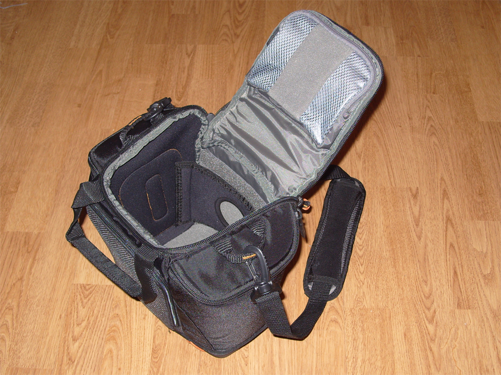 Kameraväska av större modell